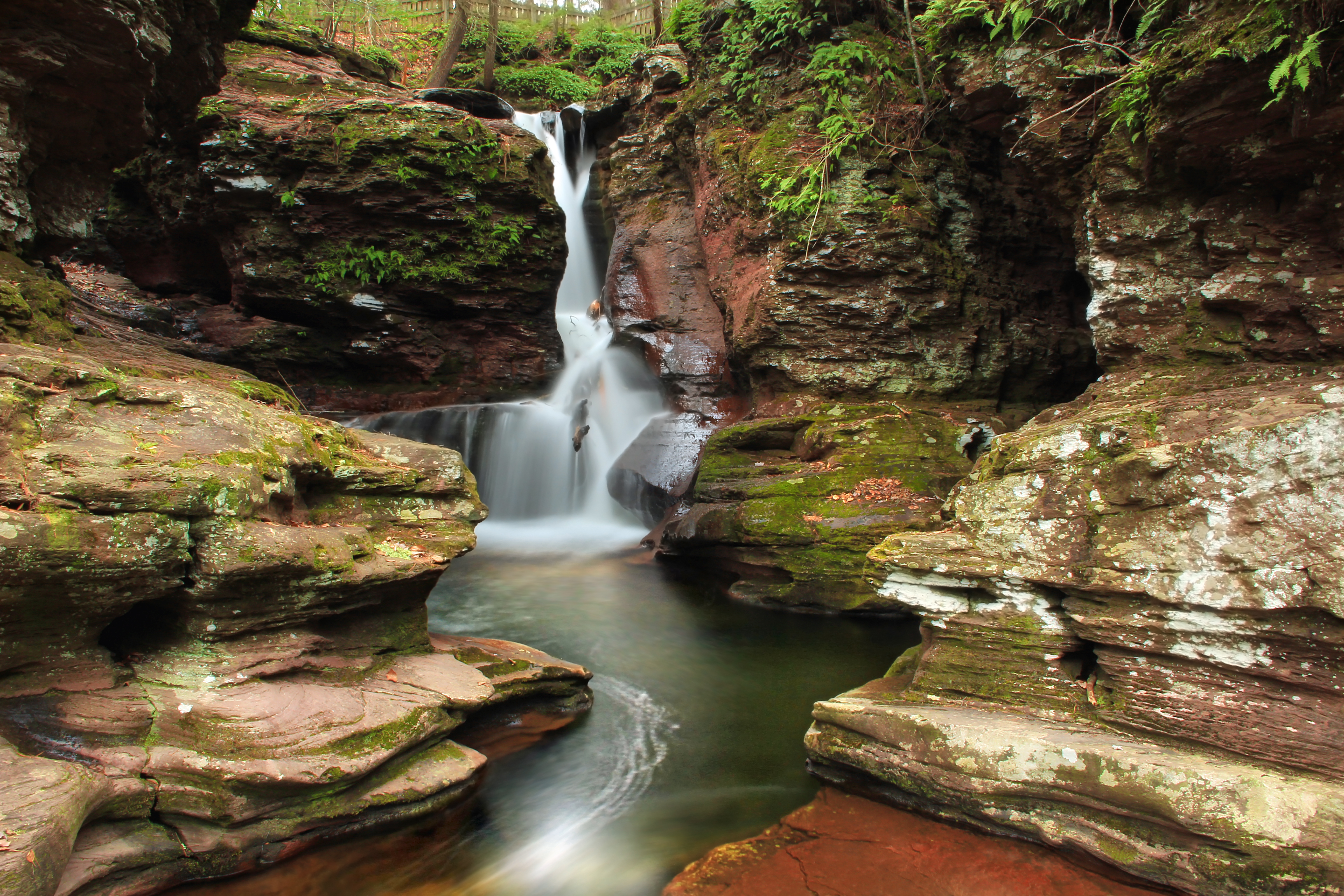 Ricketts Glen State Park, Luzerne County.